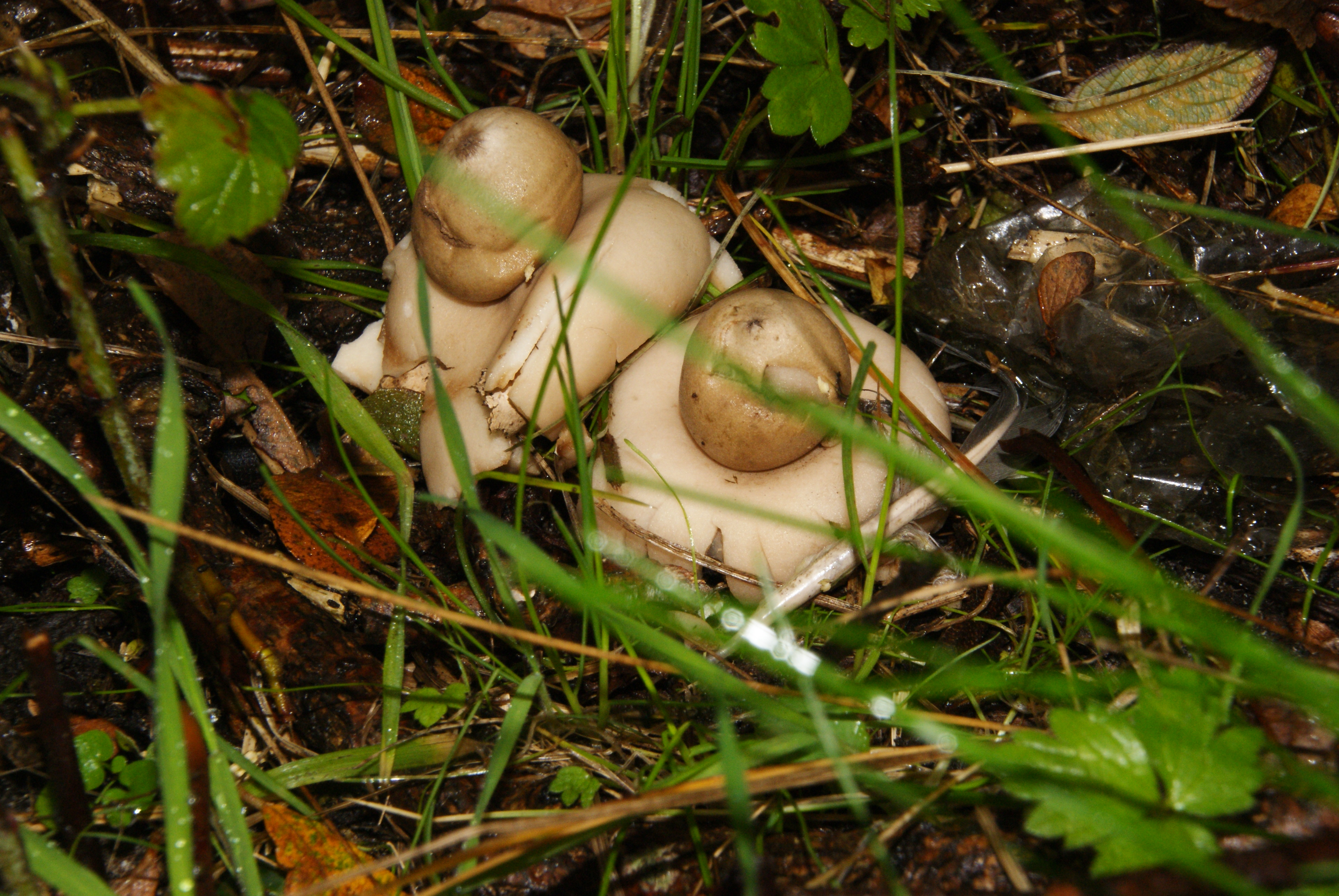 Aussi appelé Geastrum fimbriatum, champignon de la famille des Geastracaea